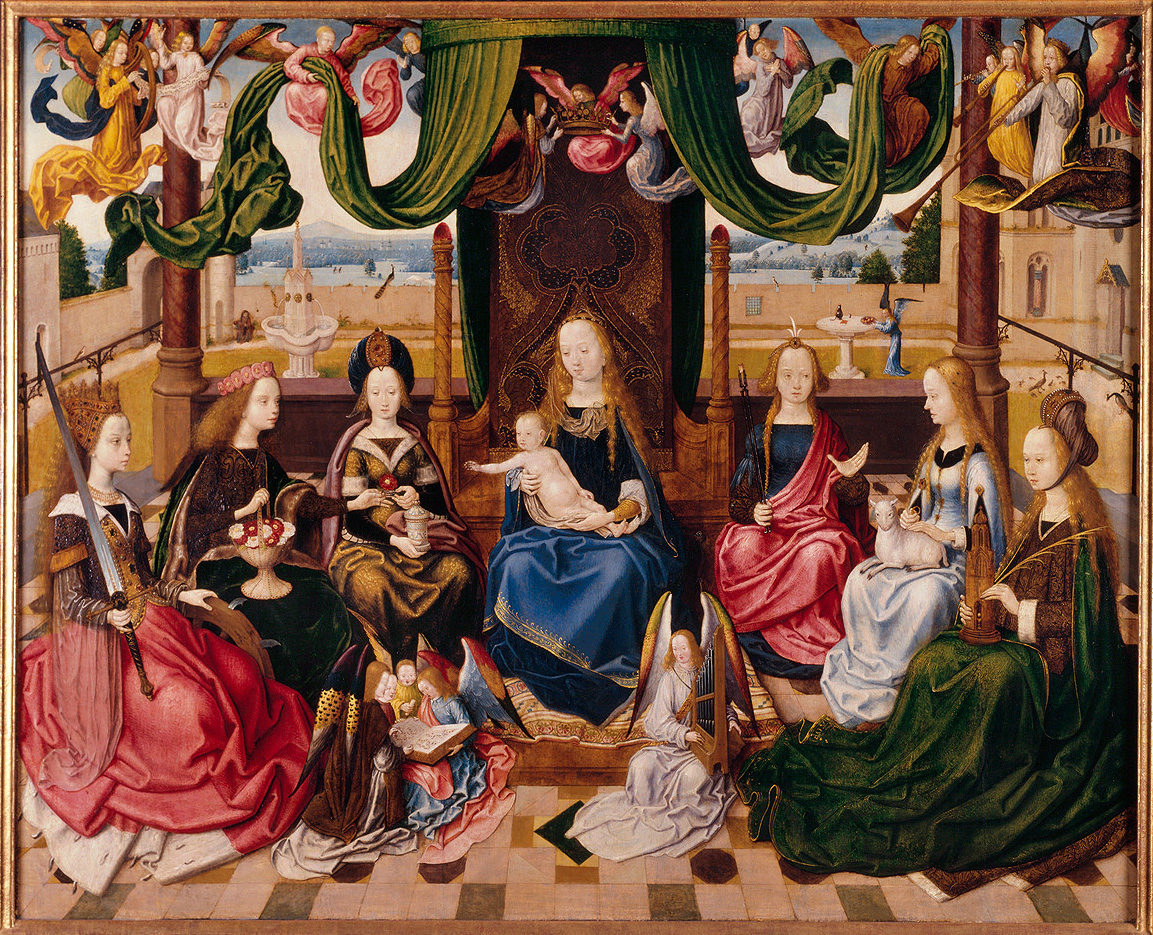 Maître de la Légende de saint Ursule - Marie entourée de saintes